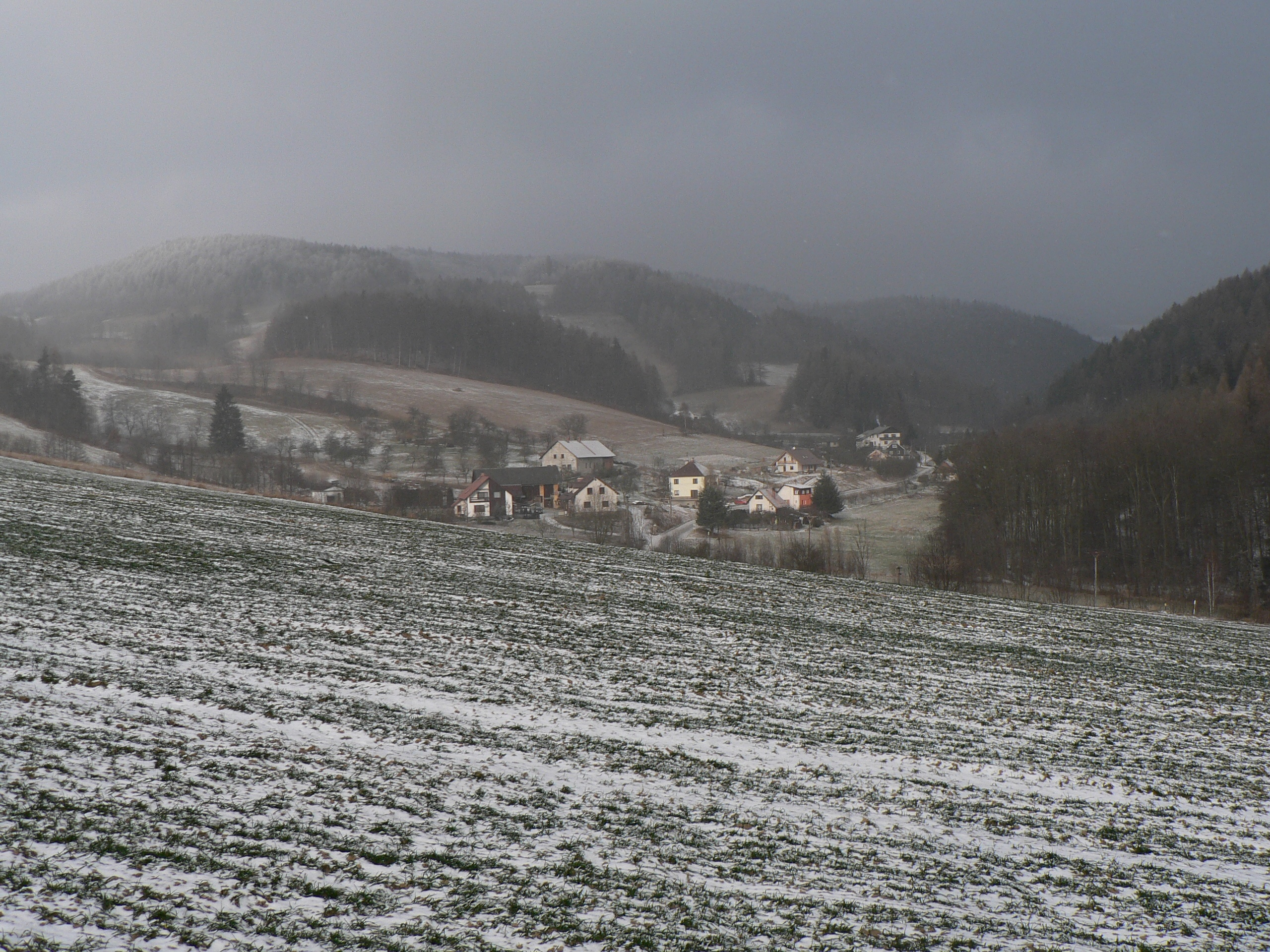 Česky: Horní část Hostic